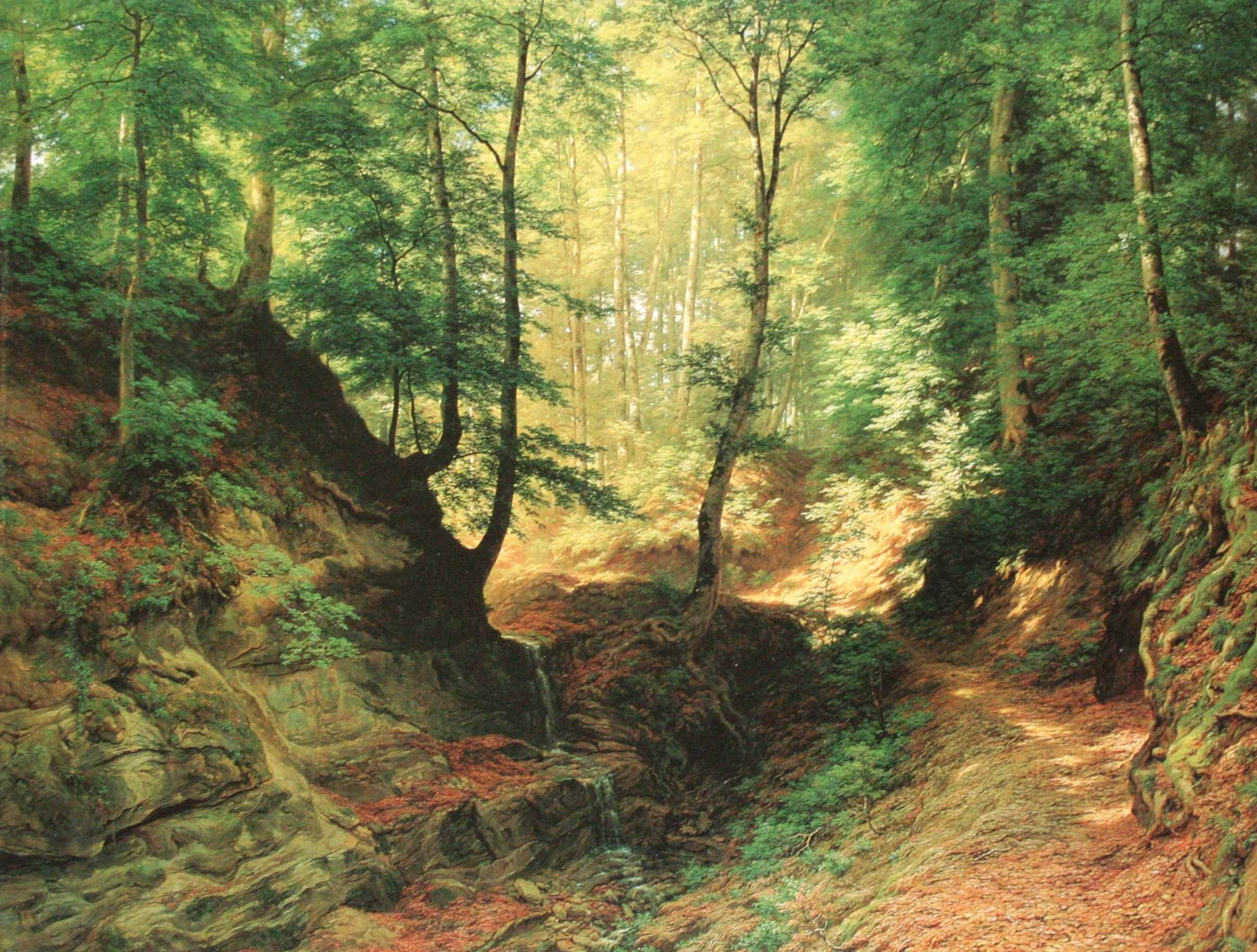 Gemälde von Robert Zünd aus den Jahren 1886/87